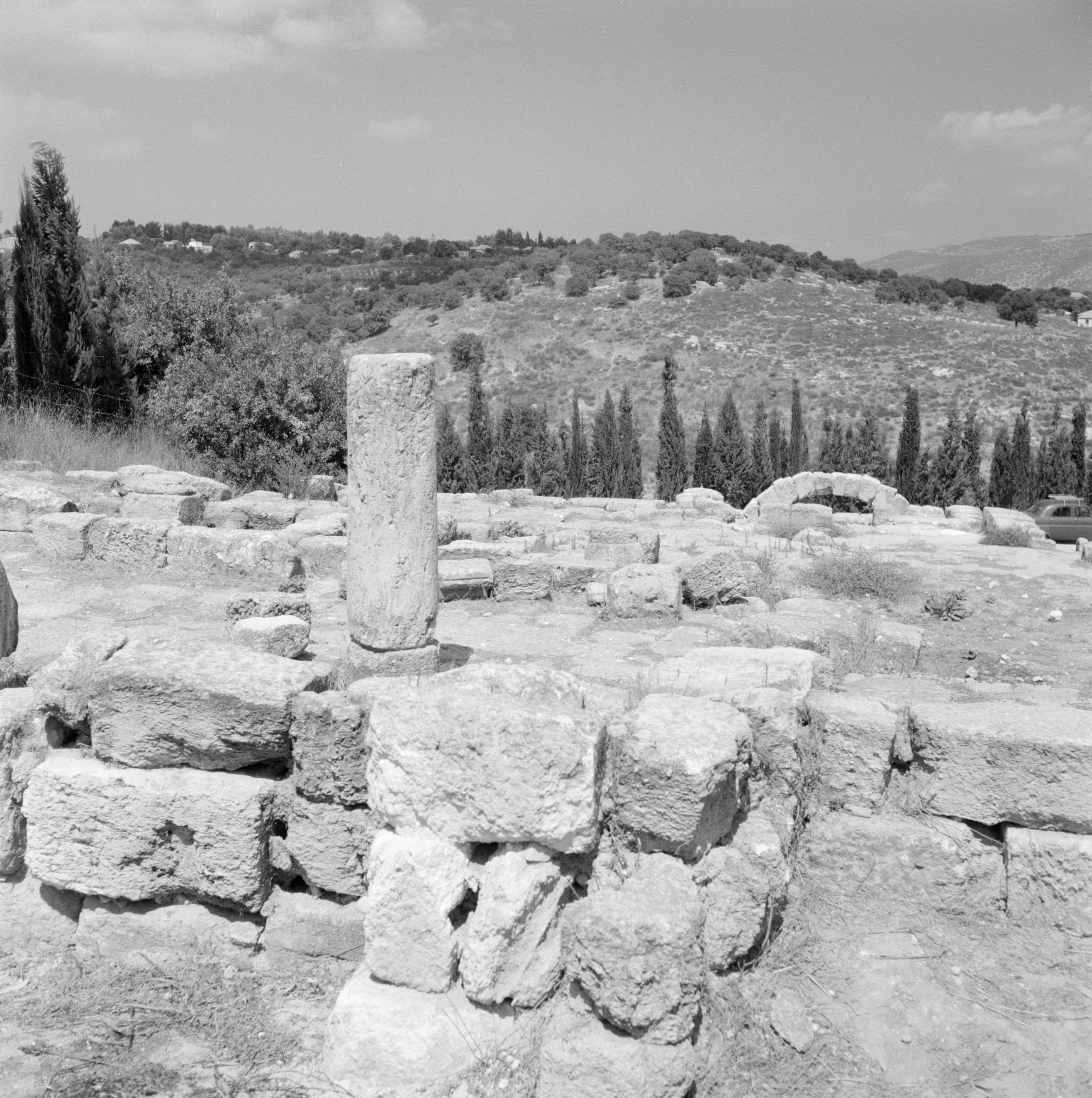 Collectie / Archief : Fotocollectie Van de Poll Reportage / Serie : Israël 1964-1965: Bet Shearim, archeologie Beschrijving : Ruines van een synagoge met op de achtergrond huizen van het nieuwe dorp Annotatie : Bet Shearim is een archeologische vindplaats in de vlakte van Jizreël in Galilea in Israël. In de 2e eeuw na Christus werd hier een stad met een necropolis aangelegd. Bet Shearim is gelegen aan de voet van het Karmelgebergte, zo'n 20 kilometer ten oosten van Haifa Datum : 1964 Locatie : Bet Shearim, Israël Trefwoorden : archeologie, dorpsbeelden, heuvels, synagogen Fotograaf : Poll, Willem van de, [onbekend] Auteursrechthebbende : Nationaal Archief Materiaalsoort : Negatief (zwart/wit) Nummer archiefinventaris : bekijk toegang 2.24.14.02 Bestanddeelnummer : 255-2604